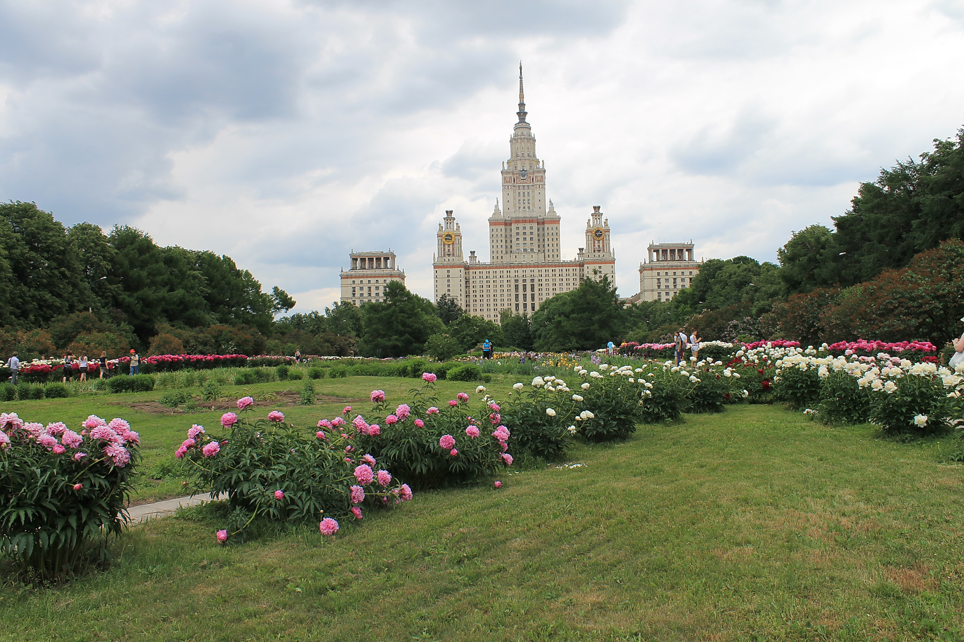 Ботанический сад Московского университета